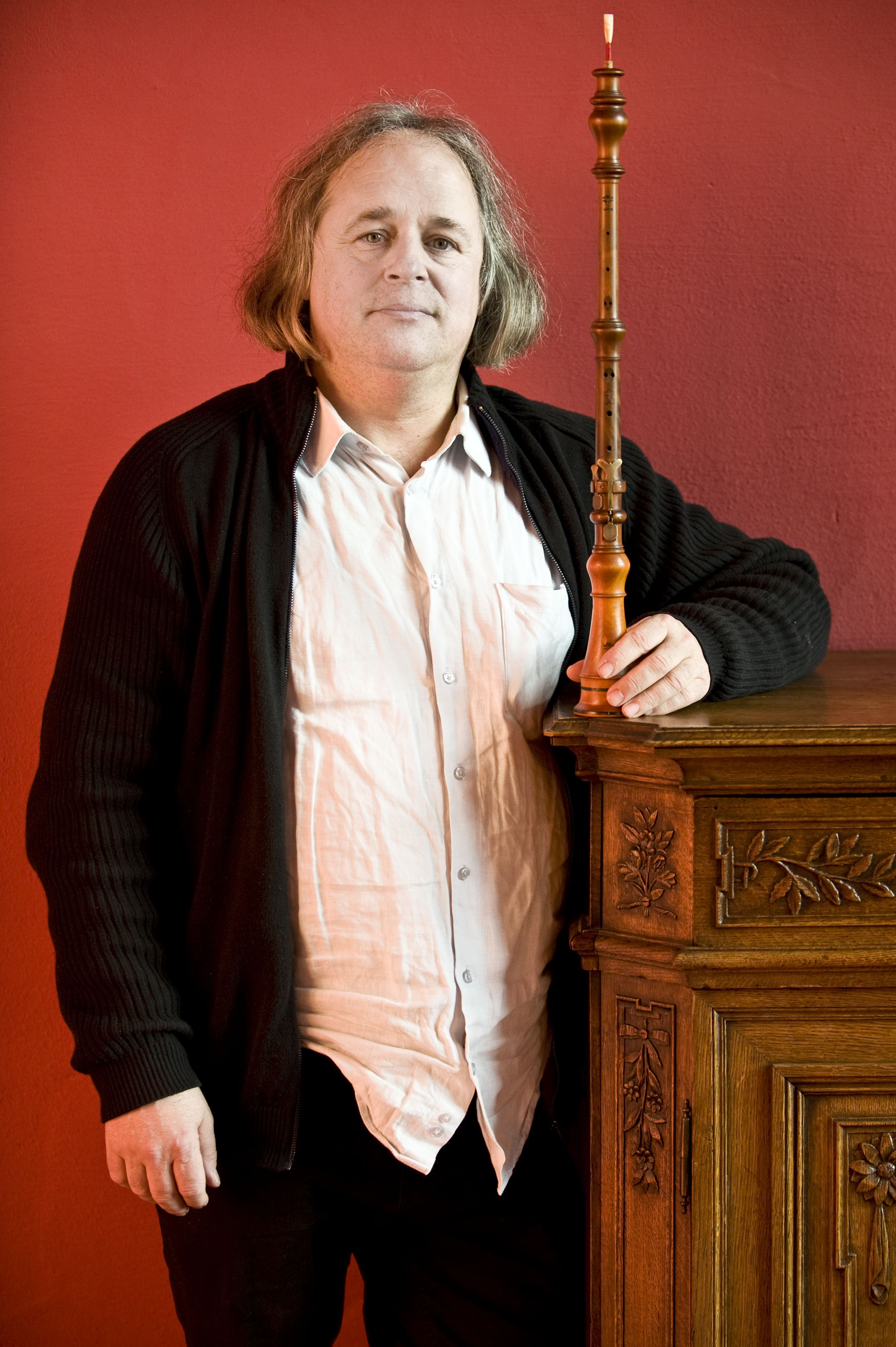 Internationaal erkend hoboïst.